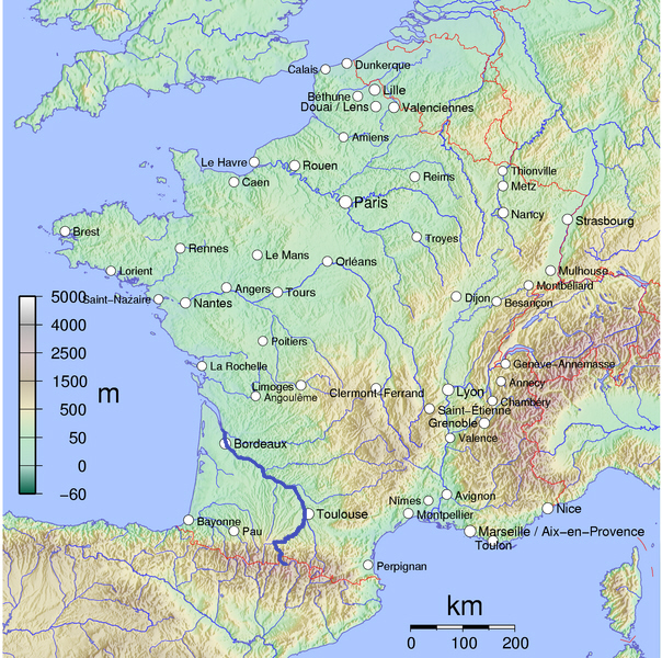 Kaart van Garonne op basis van kaart Frankrijk van Wikimedia Commons